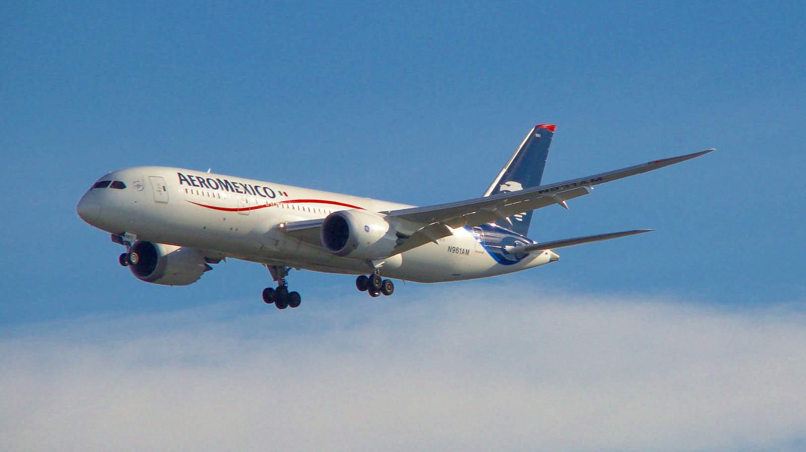 Boeing 787-8 (N961AM) de Aeroméxico aterrizando en el aeropuerto Adolfo Suárez Madrid-Barajas.